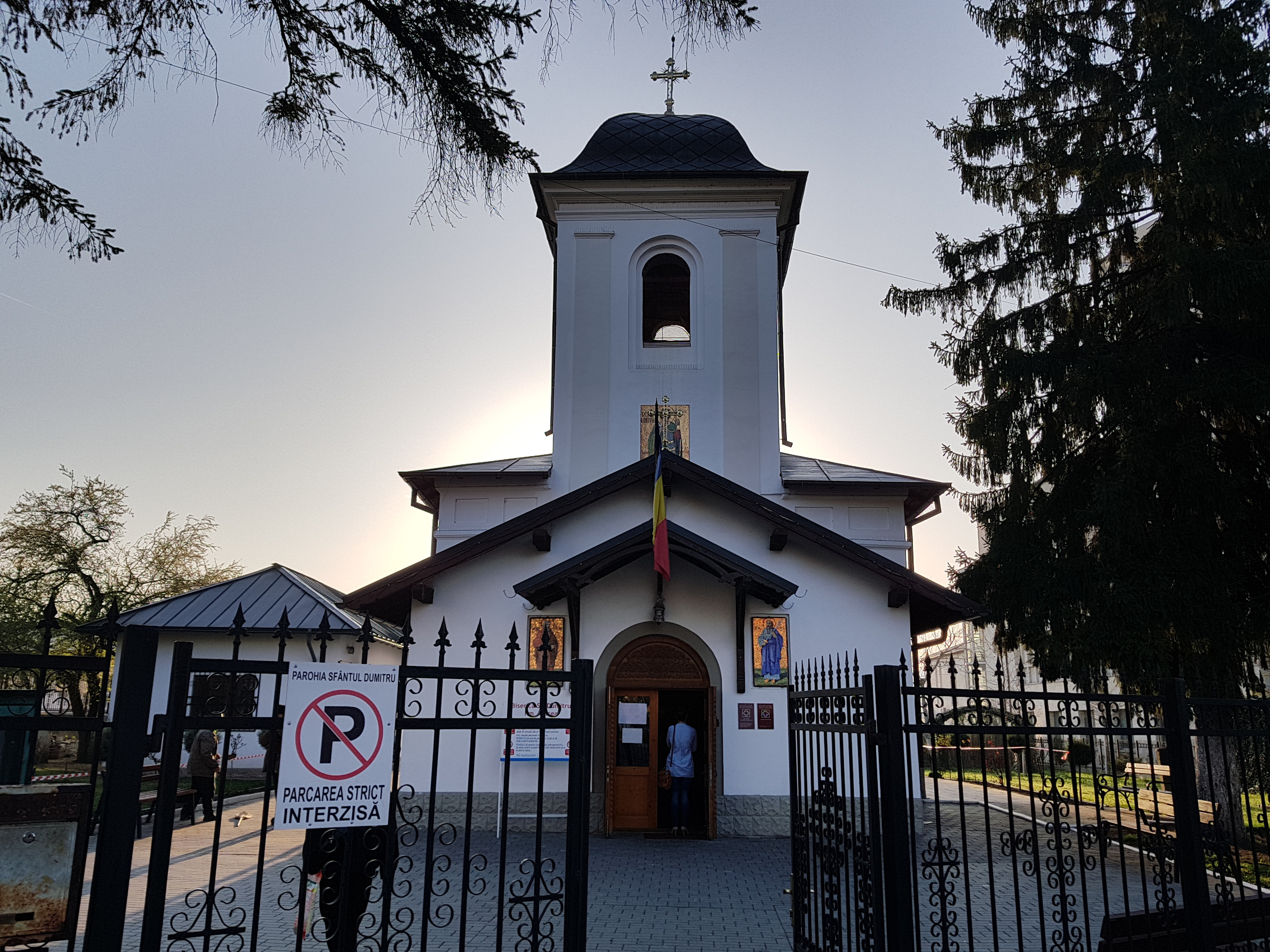 Biserica „Sf. Dumitru” (sec. XV, ref. sec. XVII, 1783-1784) municipiul Râmnicu Vâlcea, Str. Brâncoveanu Constantin 1